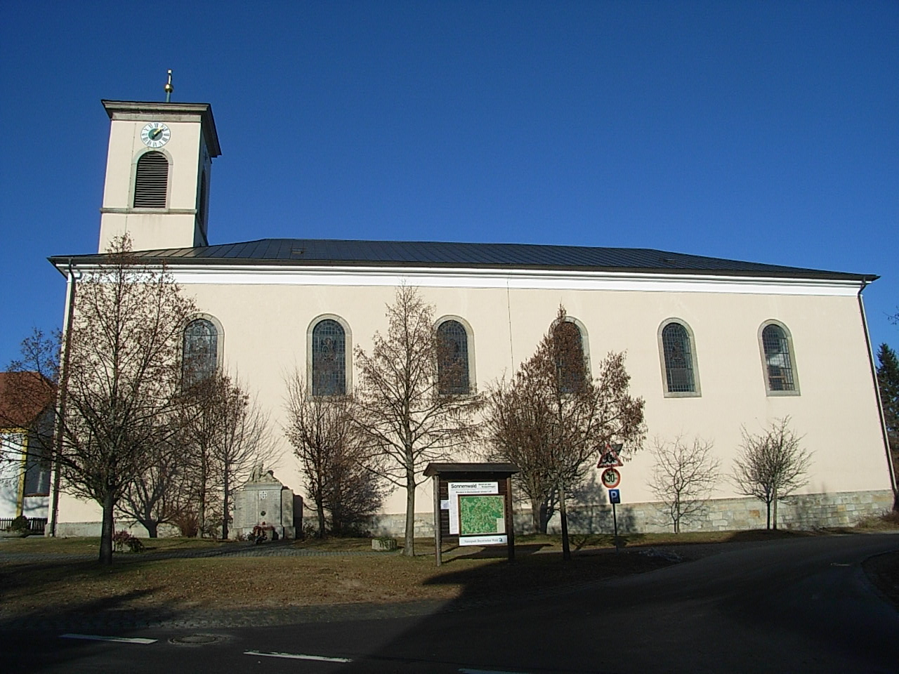 Pfarrkirche St. Nikolaus, Innernzell